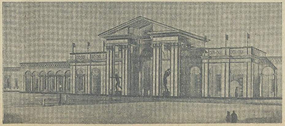 Беларуская (тарашкевіца): Менск (Miensk), Ляхаўка (Lachaŭka). Стадыён Дынама (Dynama). Праект